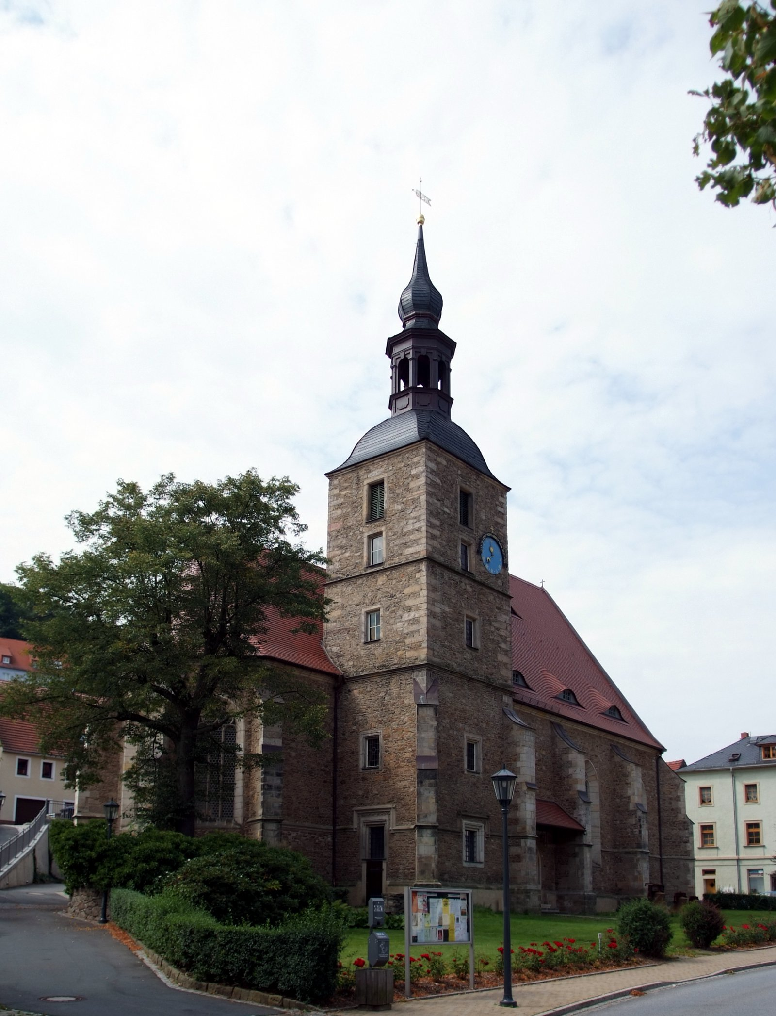 St. Wolfgang, Glashütte